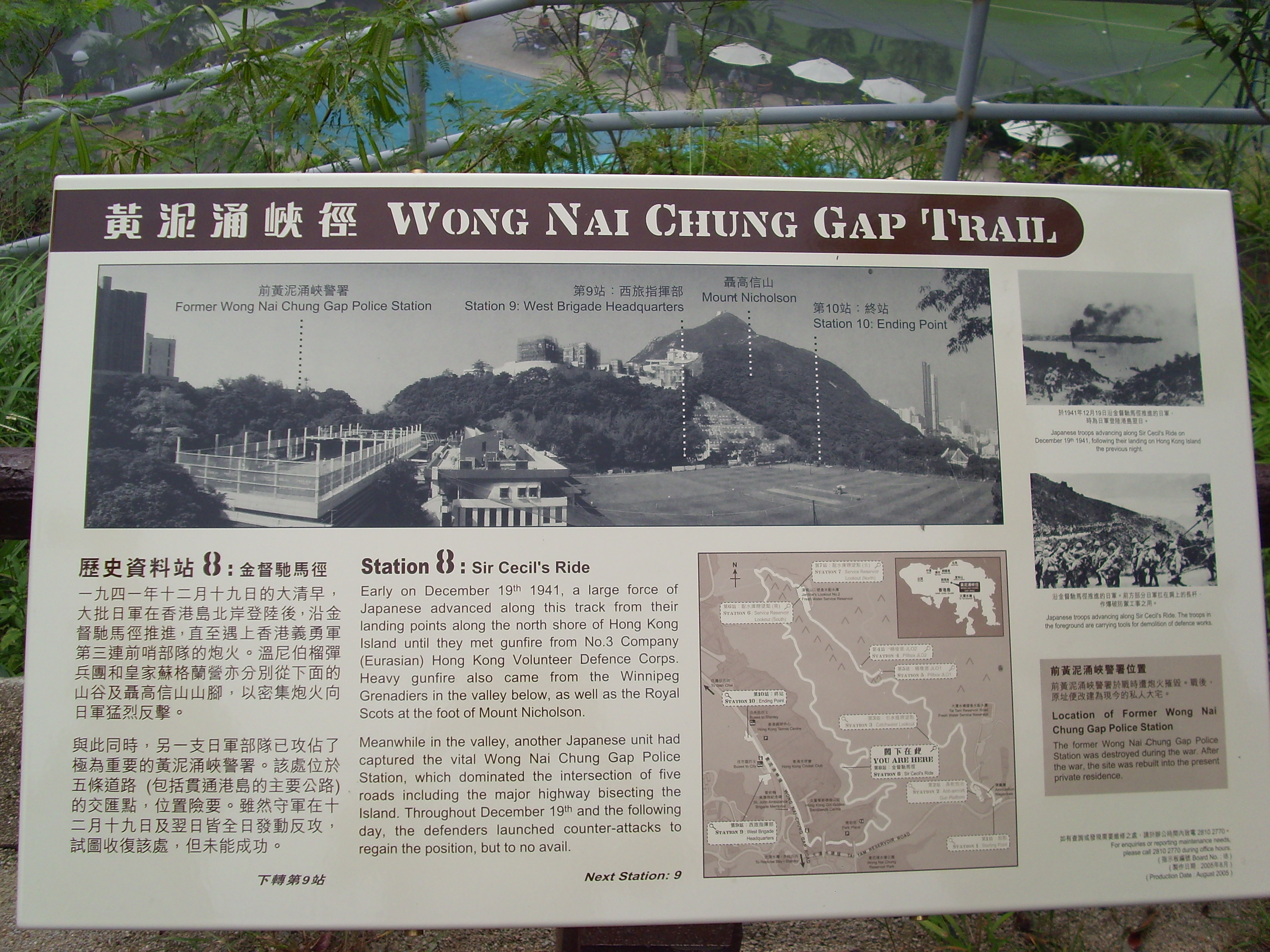 黃泥涌峽 Wong Nai Chung Gap